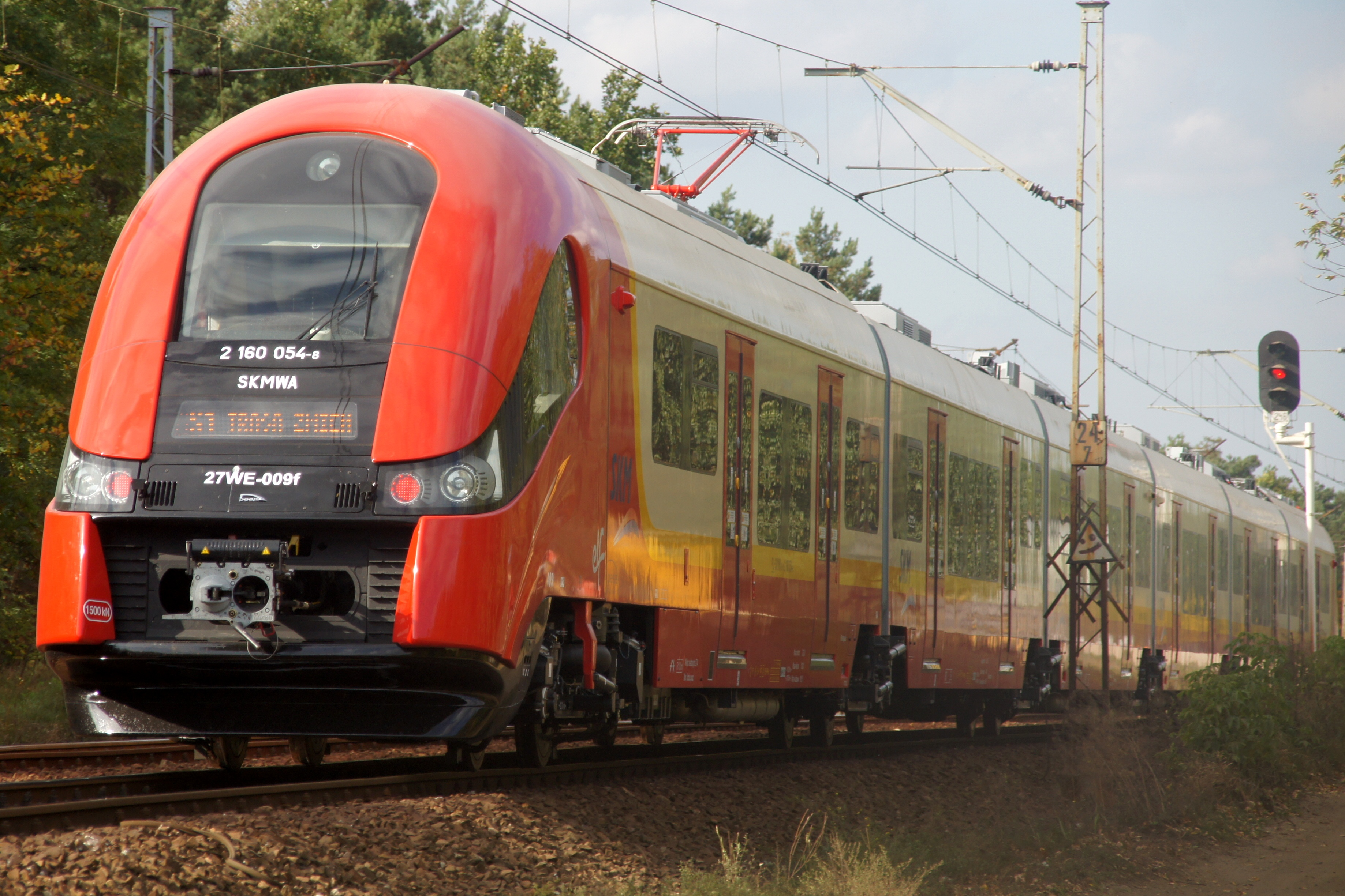 elektryczny zespół trakcyjny 27WE "Elf" na linii kolejowej nr 7 obsługujący linię S1 Warszawskiej Szybkiej Kolie Miejskiej